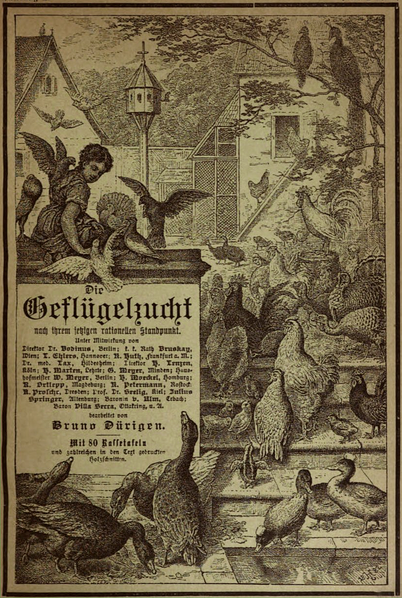 Het titelblad van "Die Geflügelzucht, nach ihrem jetzigen rationellen Standpunkt", Bruno Dürigen